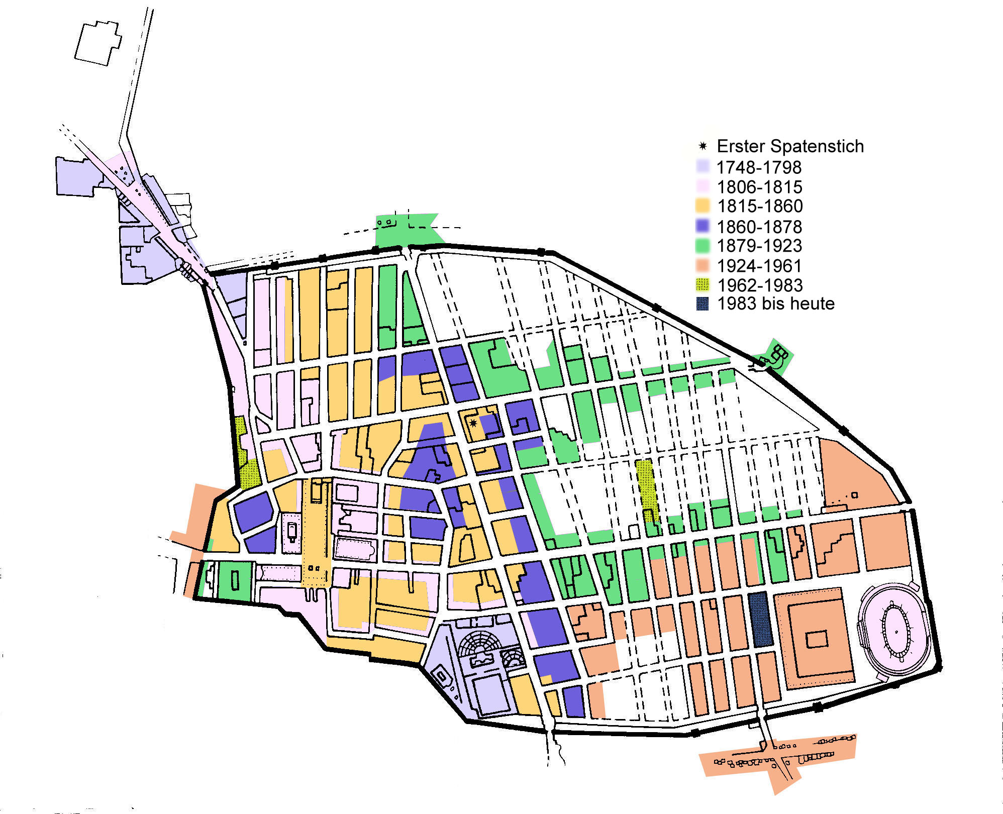 Zeitliche Abfolge der Ausgrabungen in Pompeji